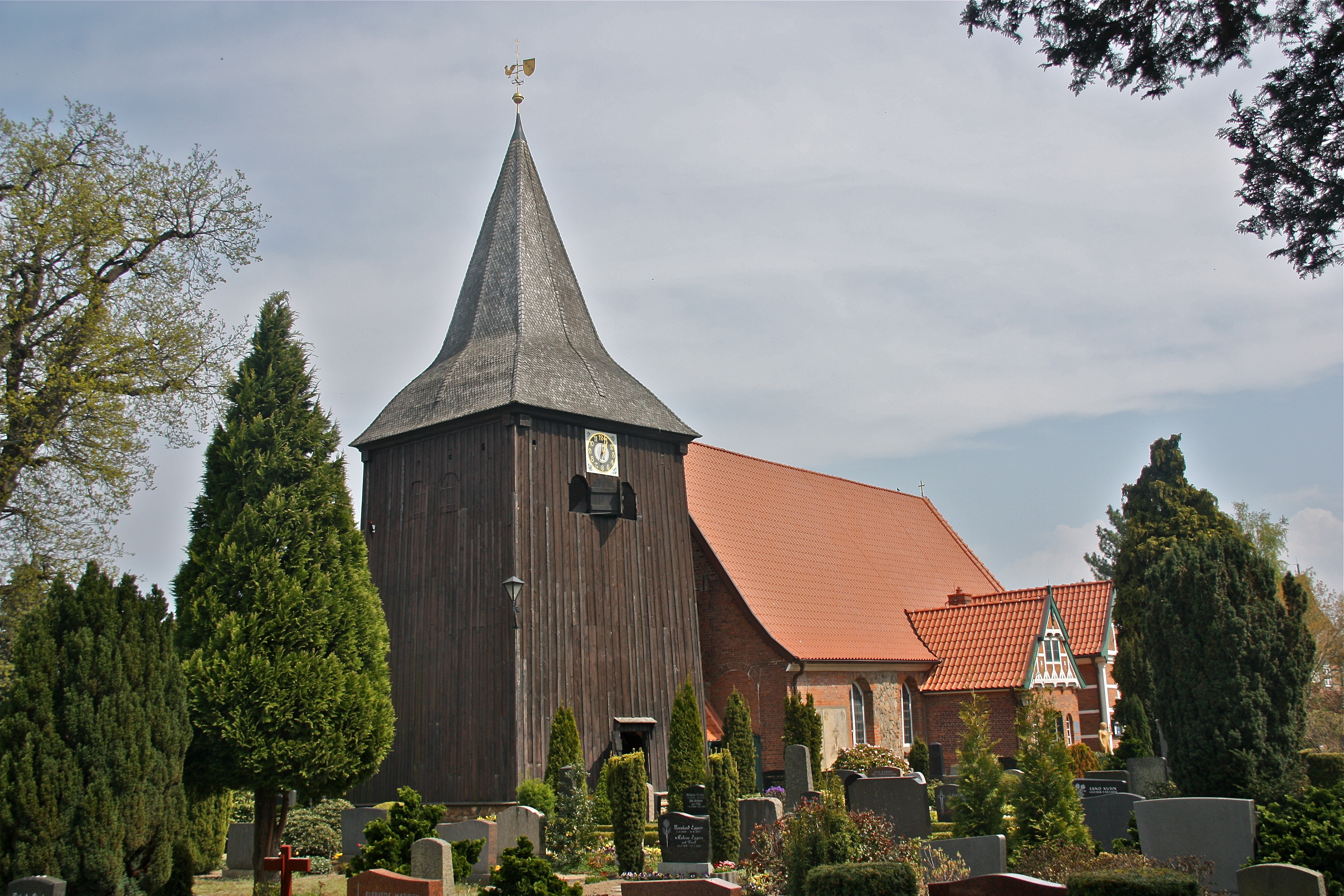 Hamburg, Altengamme, Kirche St. Nicolai, Ansicht von Südwesten This is a photograph of an architectural monument.